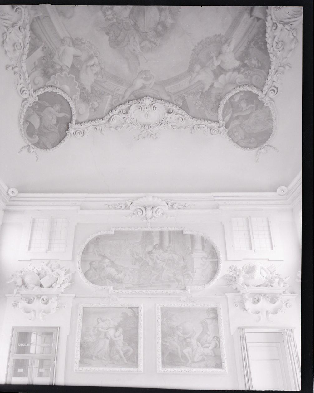 Servizio fotografico : Bologna, 1968 / Paolo Monti. - Buste: 6, Fototipi: 6 : Negativo b/n, gelatina bromuro d'argento/ pellicola ; 10x12. - ((Serie costituita da 8 negativi identificati con i nn.: 14611-14613bis, 14614-14614bis. La suddetta serie è contenuta nella scatola identificata con la numerazione 14001-14500G. - Occasione: Documentazione per la pubblicazione: Anna Maria MATTEUCCI, Carlo Francesco Dotti e l'architettura bolognese del Settecento, Bologna, Edizioni Alfa, 1968. - Fonte: Monografia di Matteucci, Anna Maria: Carlo Francesco Dotti e l'architettura bolognese del Settecento, Bologna, Edizioni Alfa (1968)